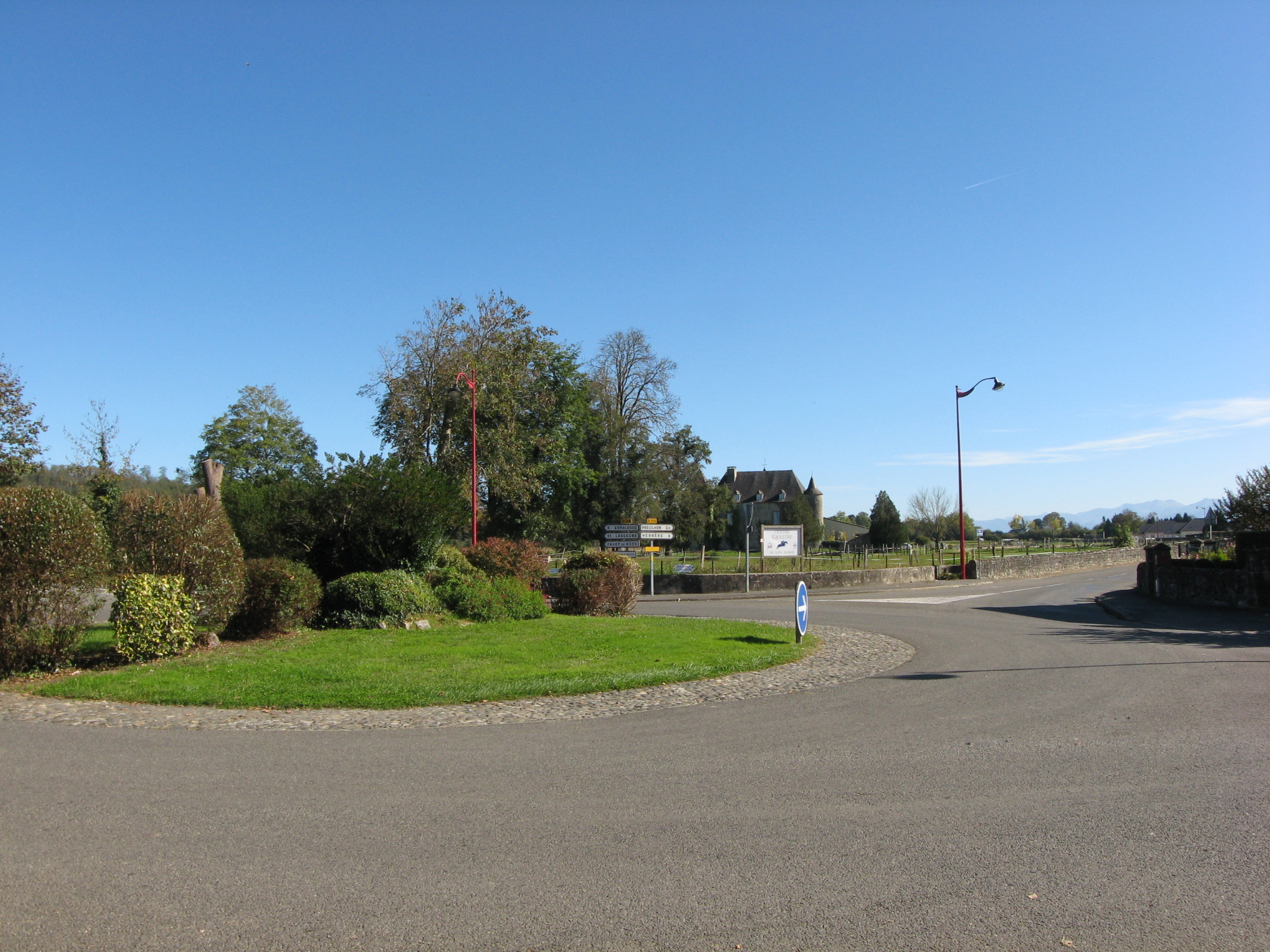 Route de Précilhon vue depuis Goès Pyrénées).